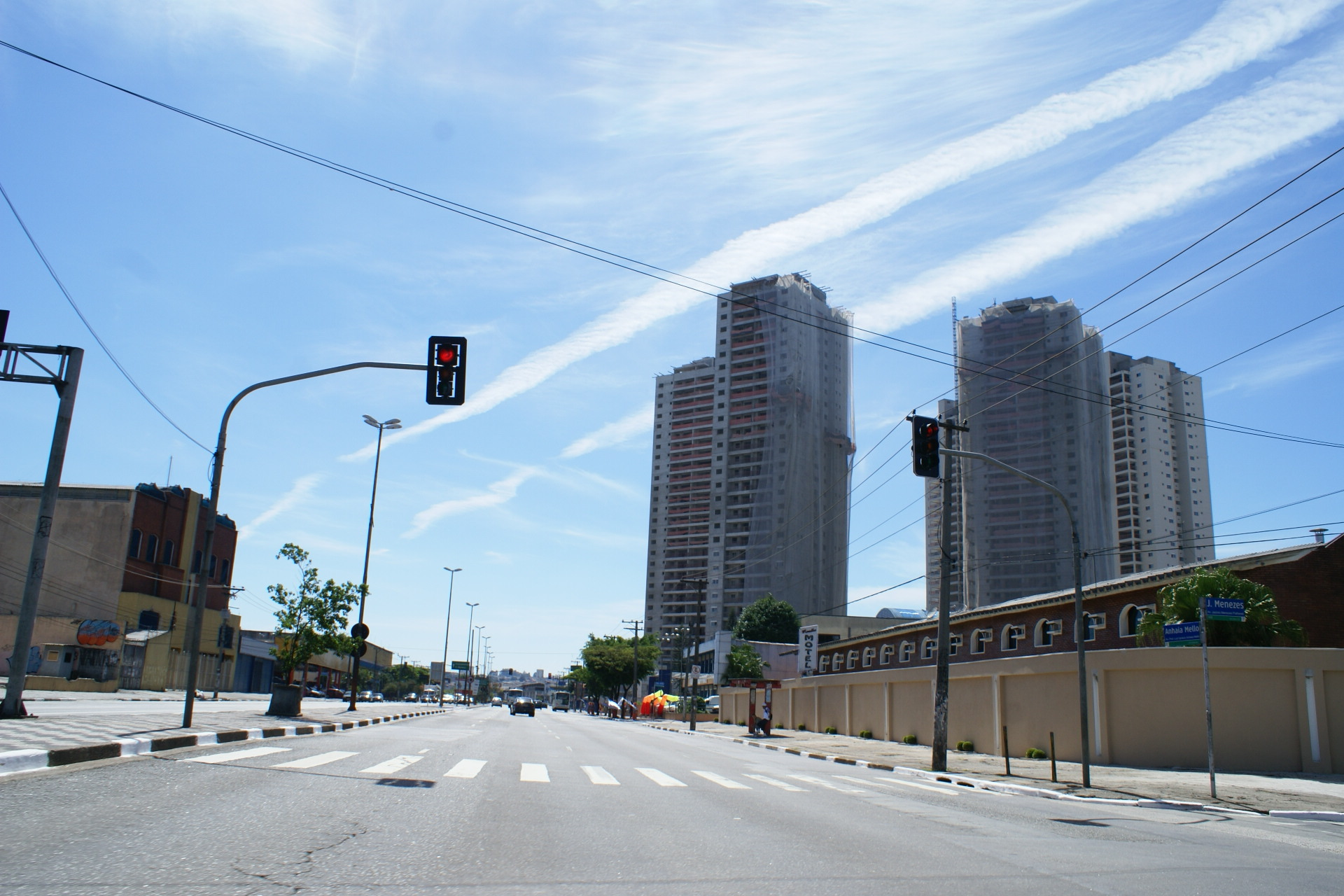 Avenida Profº Luís Ignácio de Anhaia Mello, São Paulo, Brasil. - Profº Luís Ignácio de Anhaia Mello Avenue, São Paulo City, Brazil.